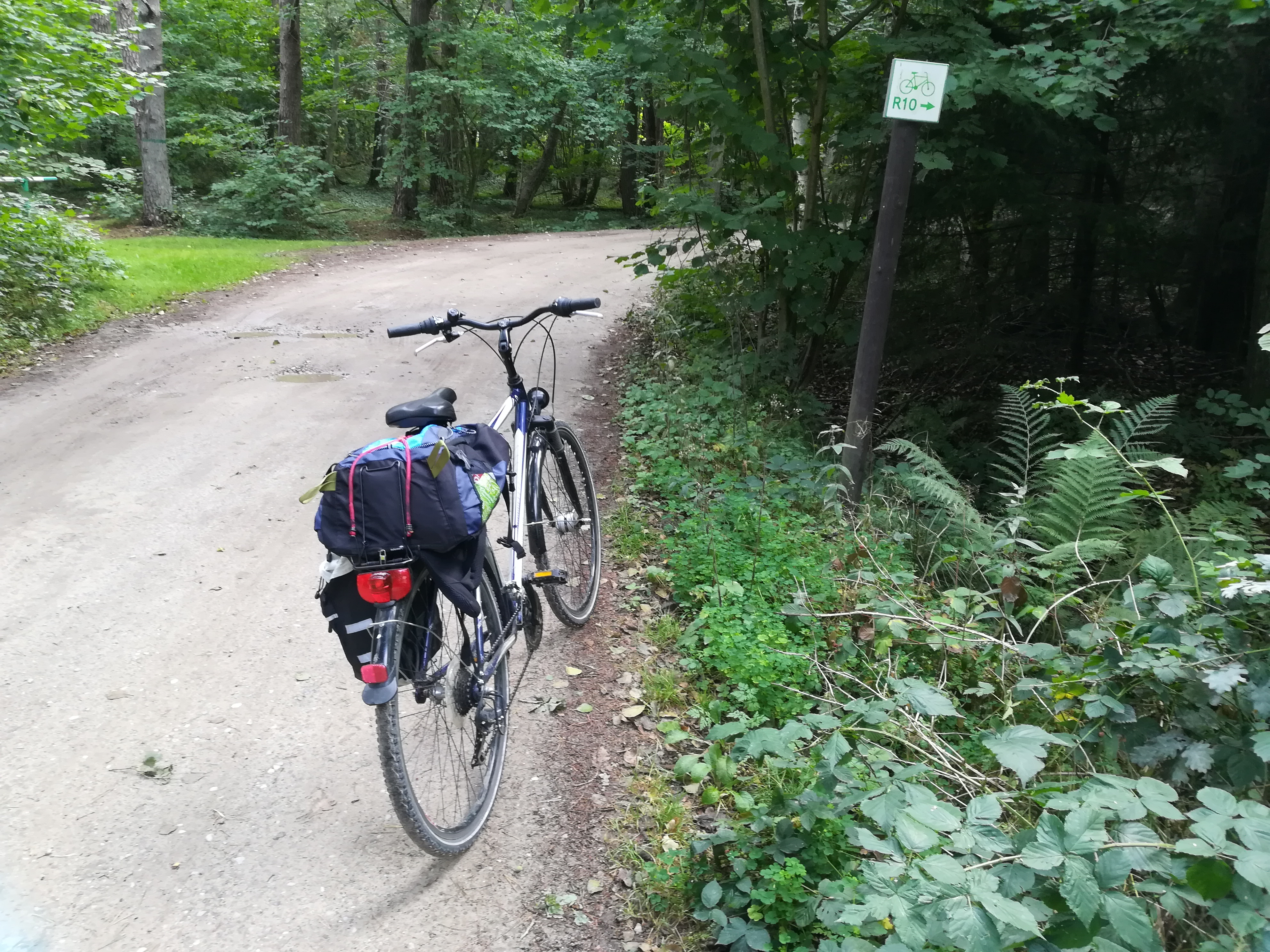 Szlak rowerowy między Dębkami, a Karwieńskimi Błotami.